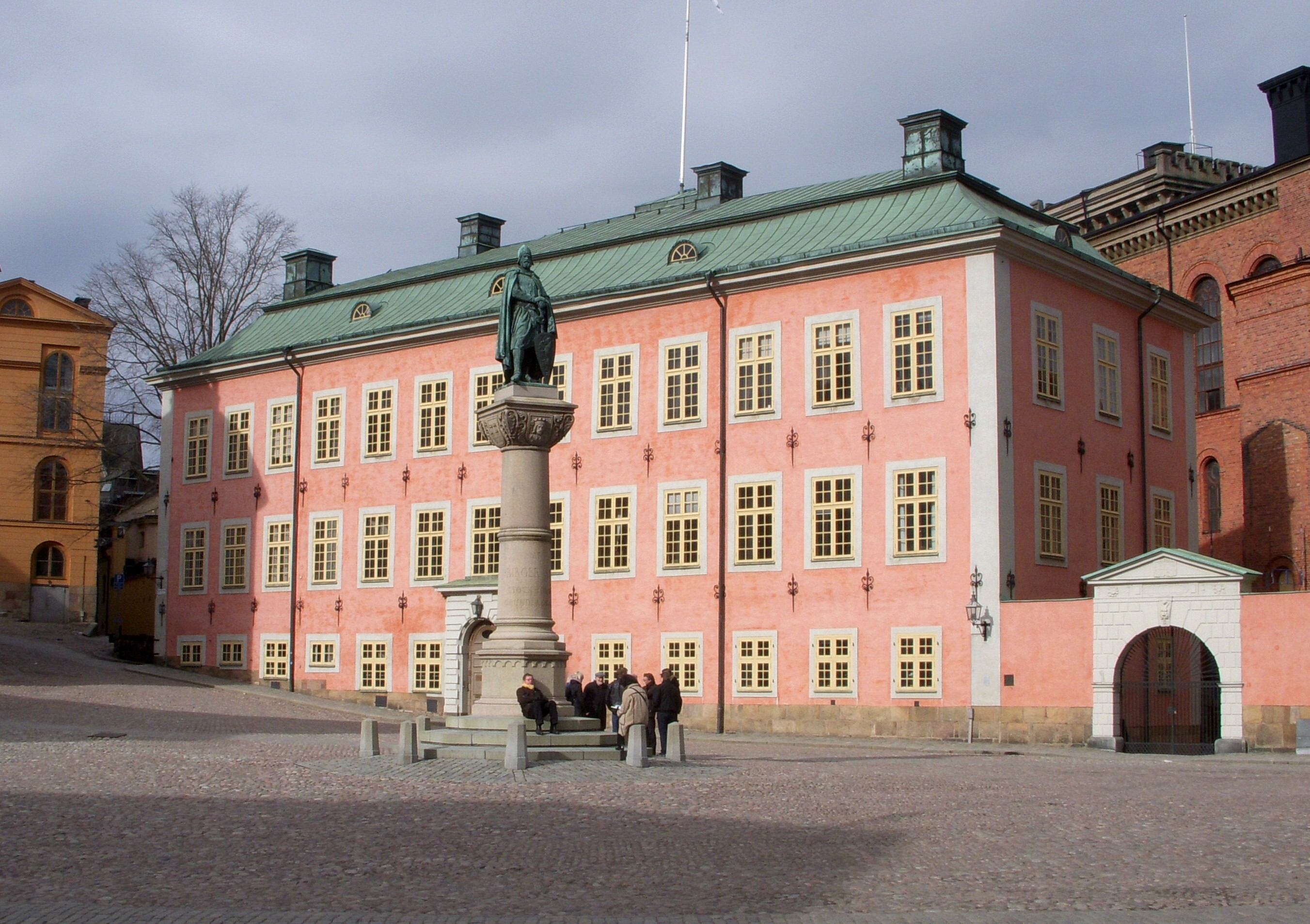 Stenbockska huset på Riddarfjärden i Stockholm